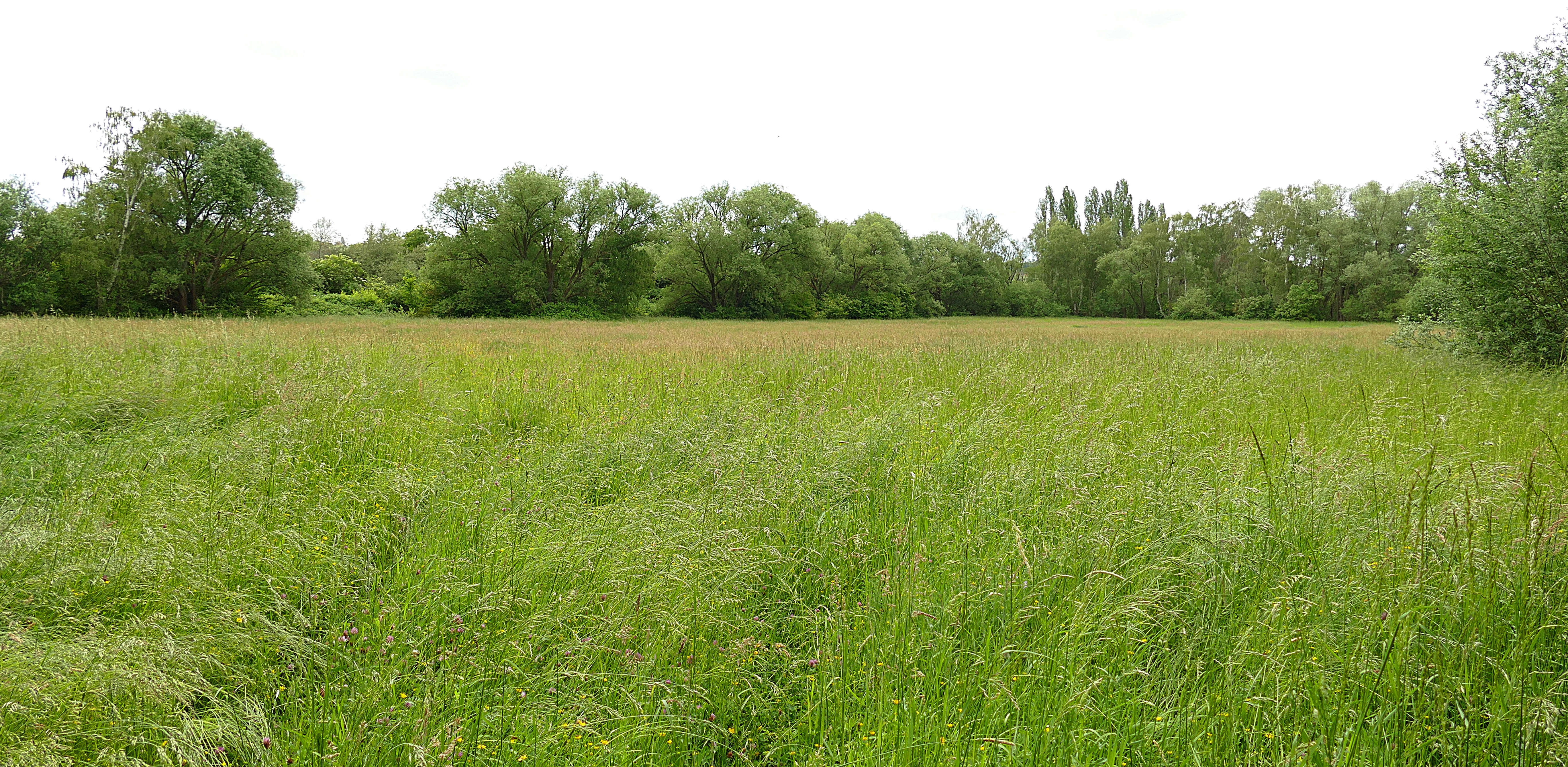 Naturschutzgebiet Harheimer Ried in Frankfurt, Wiese im Ried